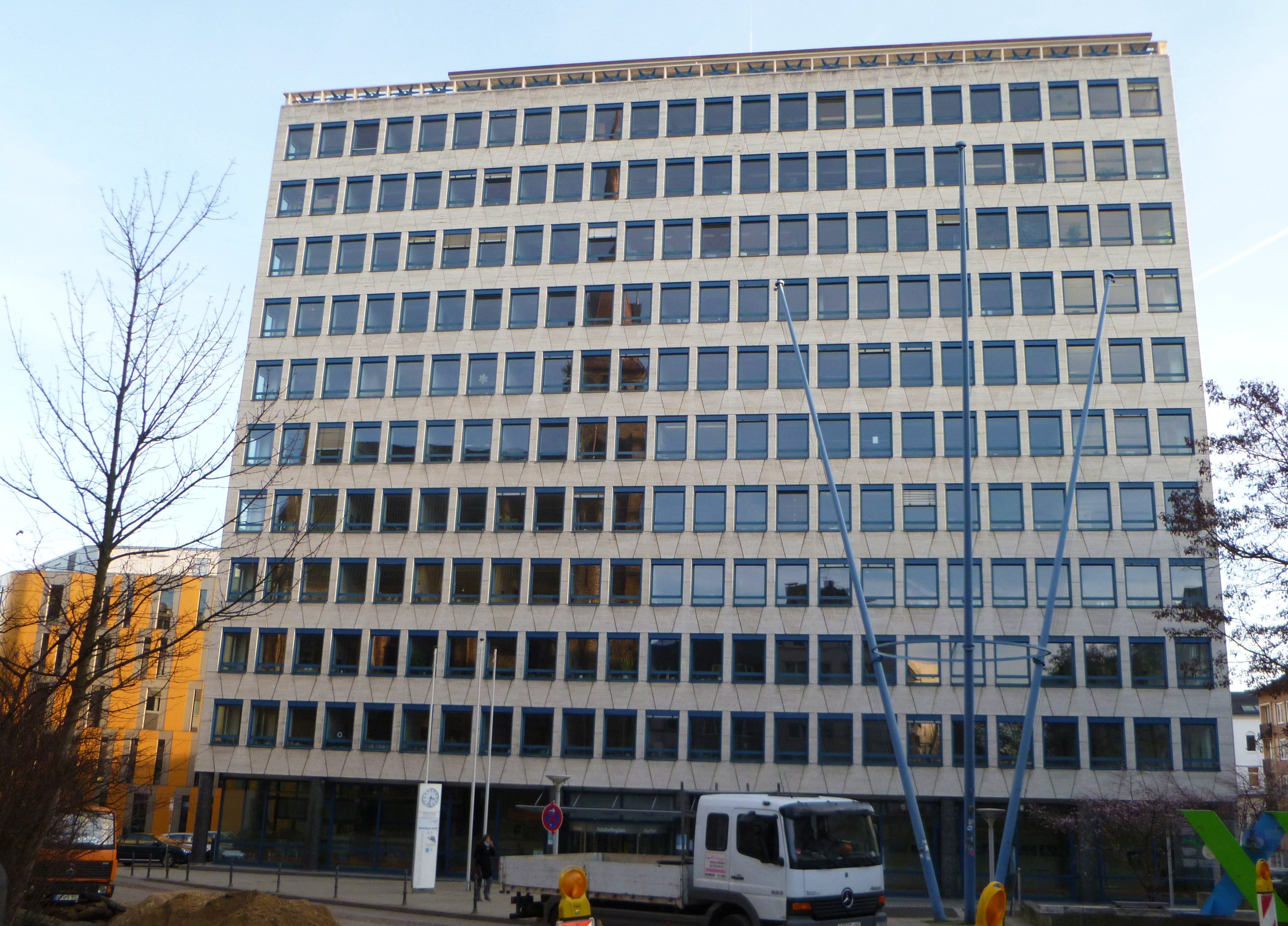 Baudenkmal in Aachen-Burtscheid